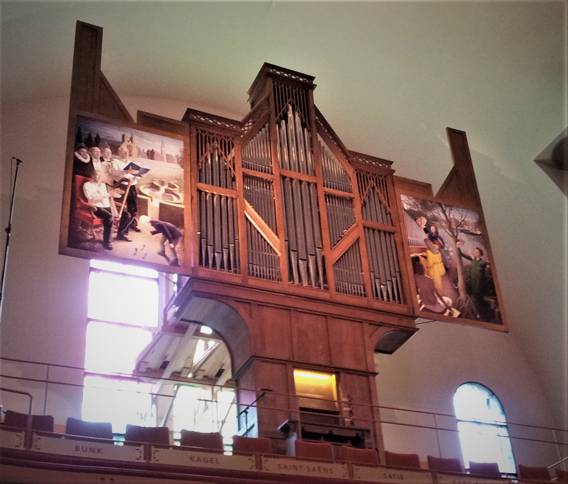 Deze foto toont de voorkant van het Van Straten orgel in het Orgelpark te Amsterdam met de twee geopende luiken waarop aan de linkerkant een afbeelding van Rudi van Straten staat. Deze foto is genomen op 21 april 2012 genomen tijdens de ingebruikname van het orgel.